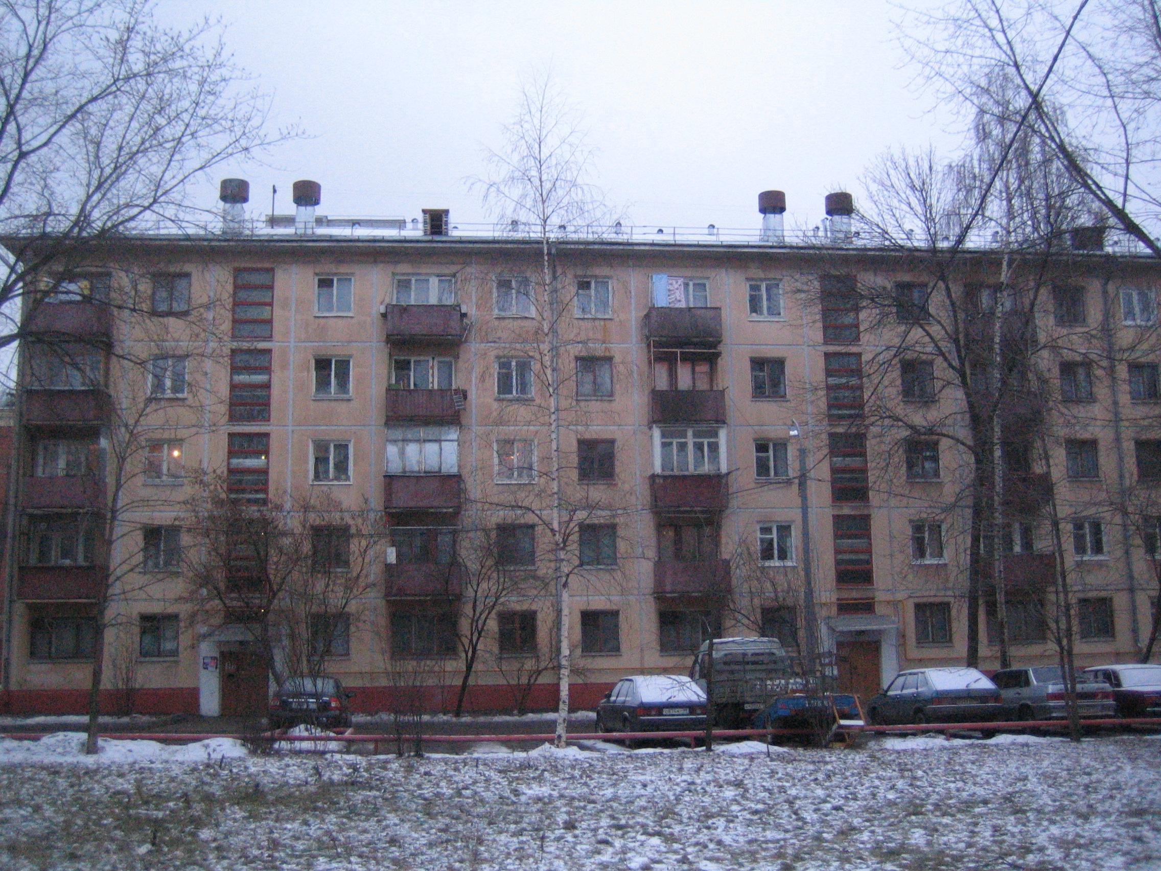 Дом серии 1-335 в Москве (5-я ул. Соколиной горы)